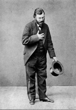 Désiré Charles Emmanuel van Monckhoven (25 septembre 1834 à Gand–25 septembre 1882 à Gand) est un chimiste, opticien et physicien belge.